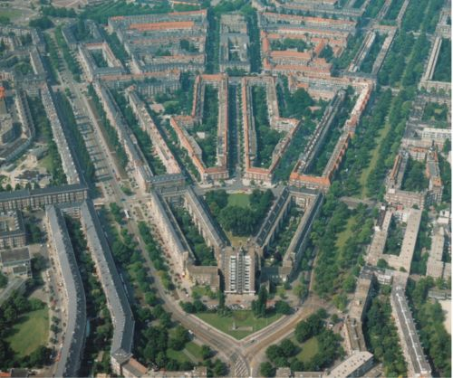 Deze luchtfoto, die de Wolkenkrabber en een deel van de Rivierenbuurt toont, is gedateerd op 1995 en is door Wikipedia medewerker zelf gemaakt